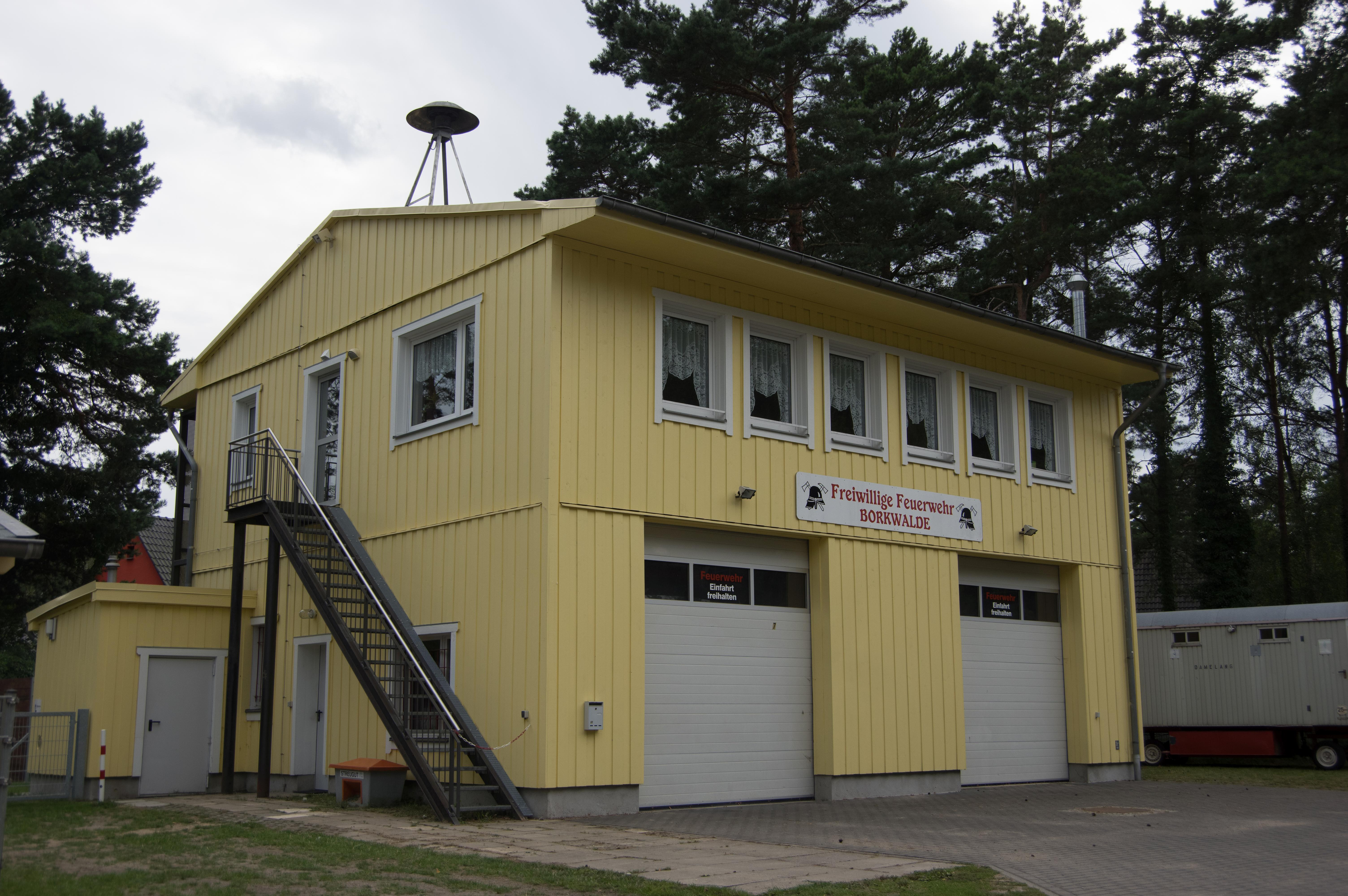 Borkwalde in Brandenburg. Das Gebäude der Freiwilligen Feuerwehr in Borkwalde.